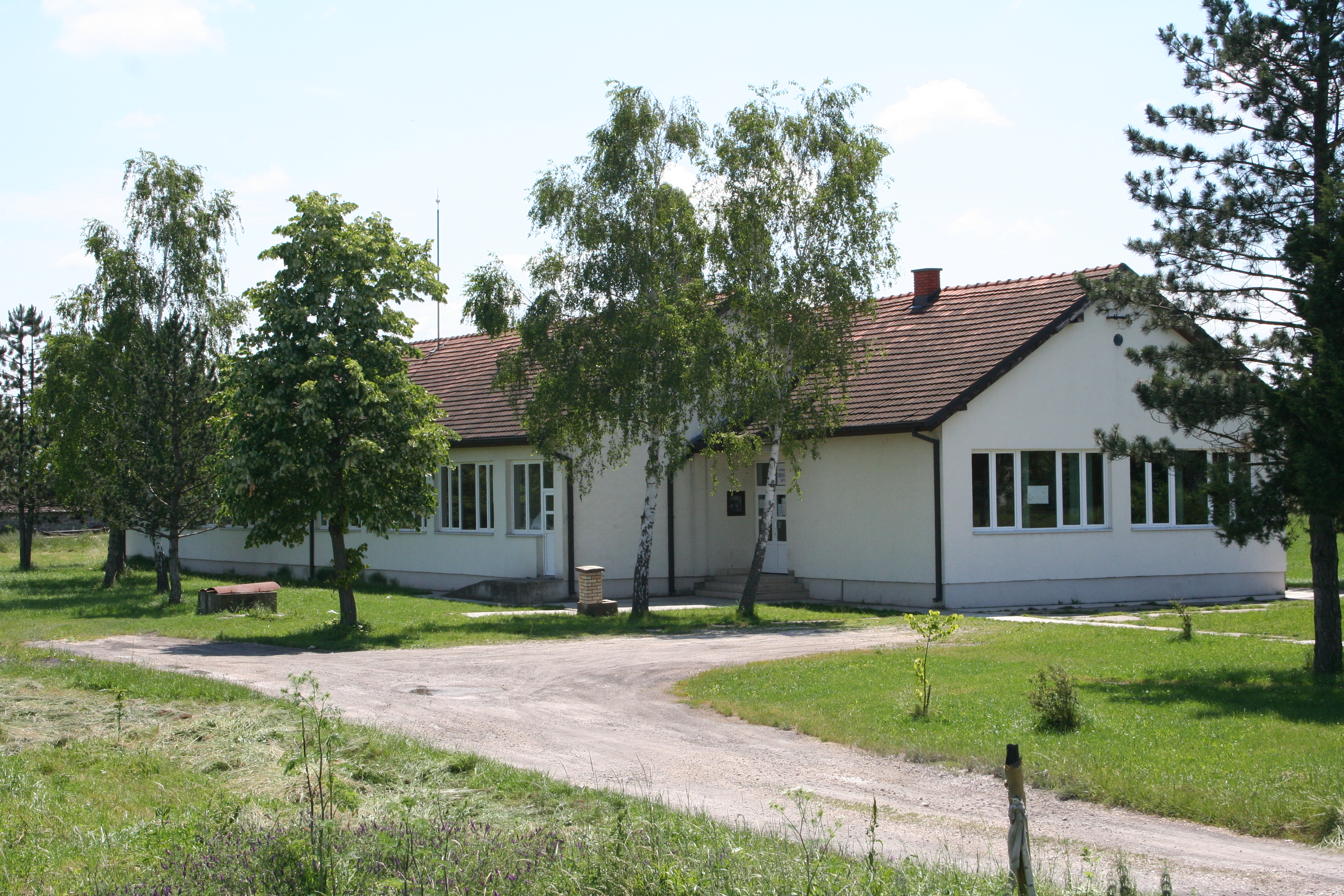 Zgrada "velike" škole, Cerovac grad Šabac